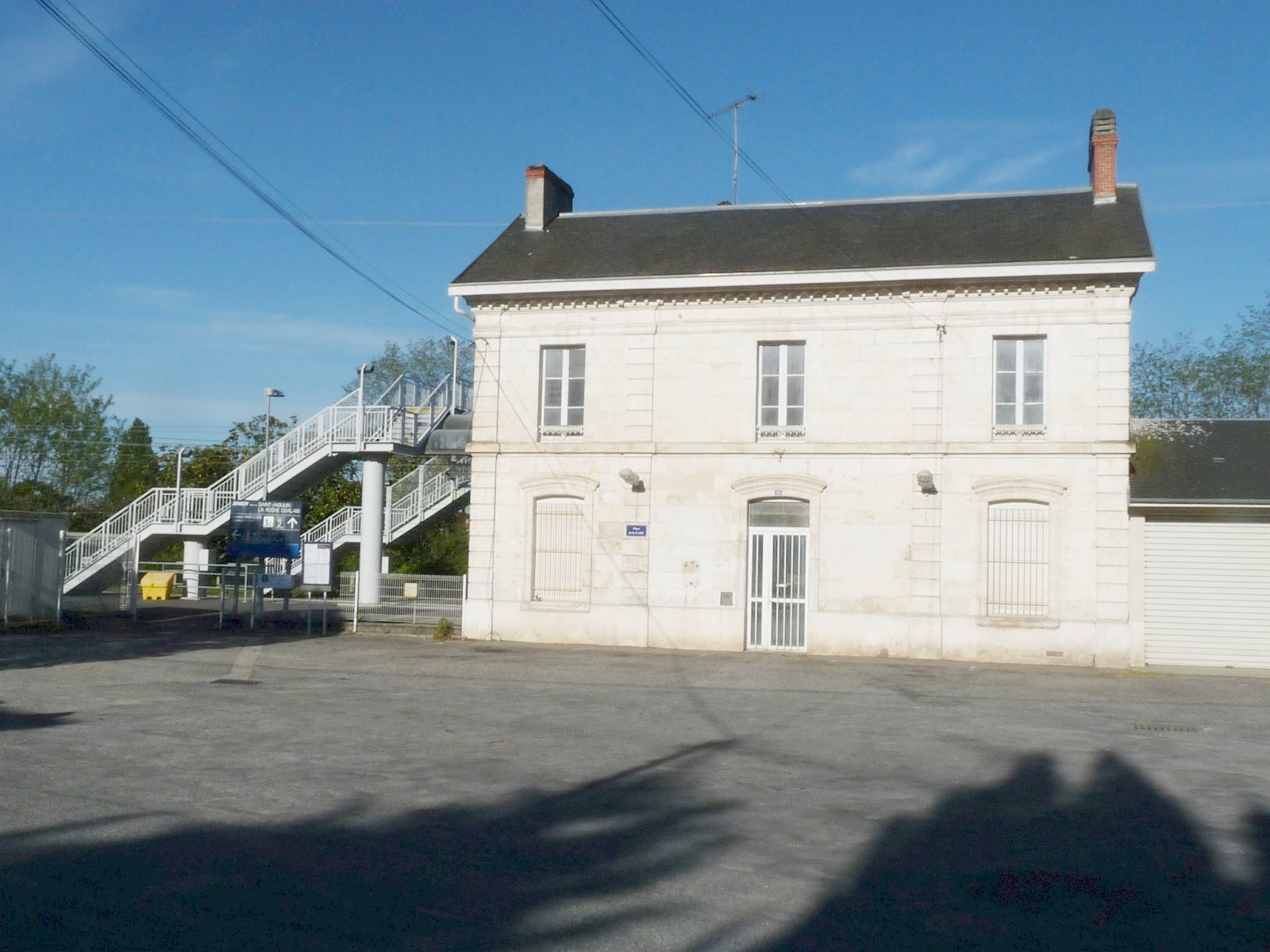 Gare de St-Aigulin-La Roche-Chalais, Charente-Maritime, France